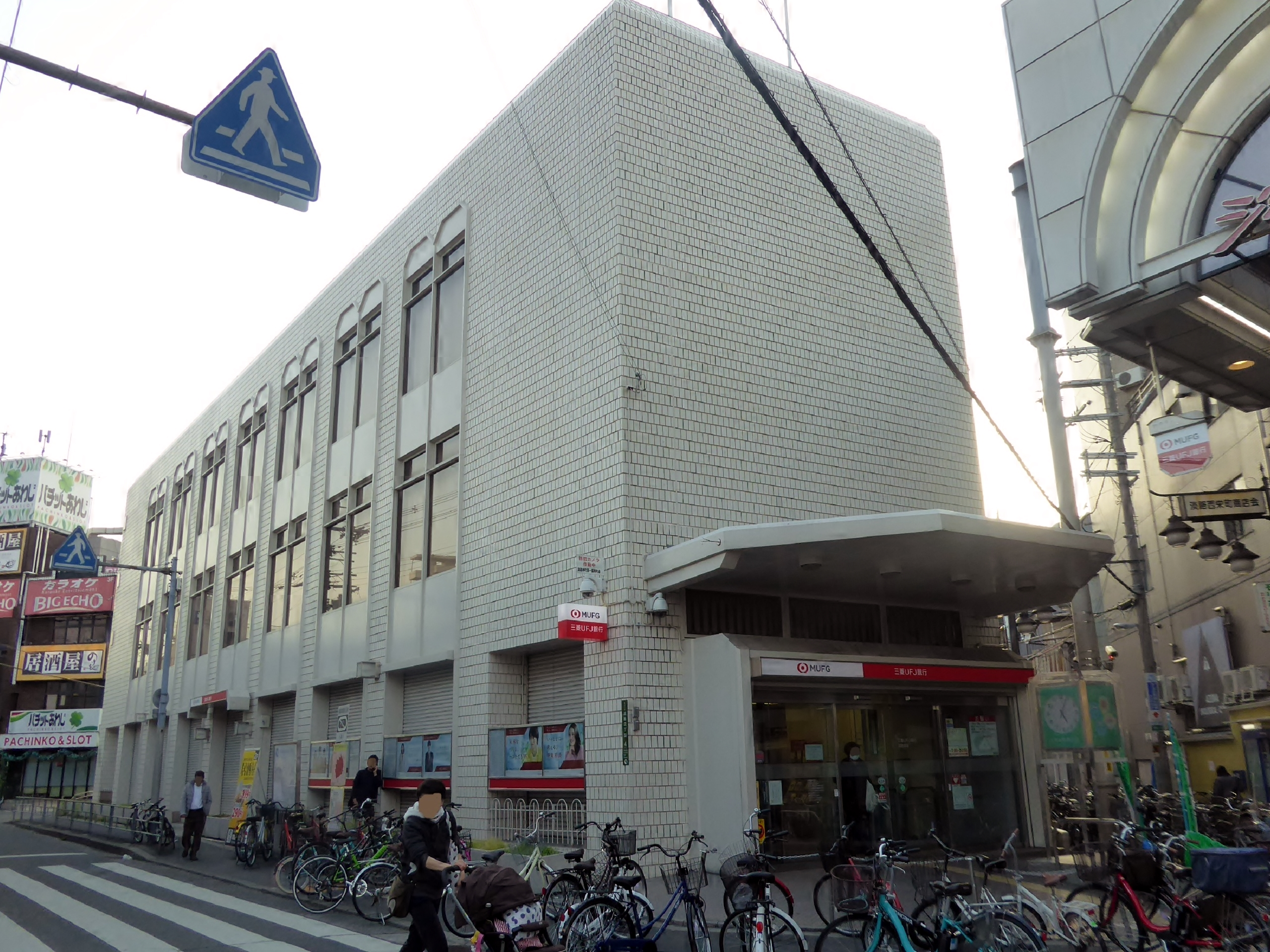 三菱UFJ銀行淡路支店を撮影。